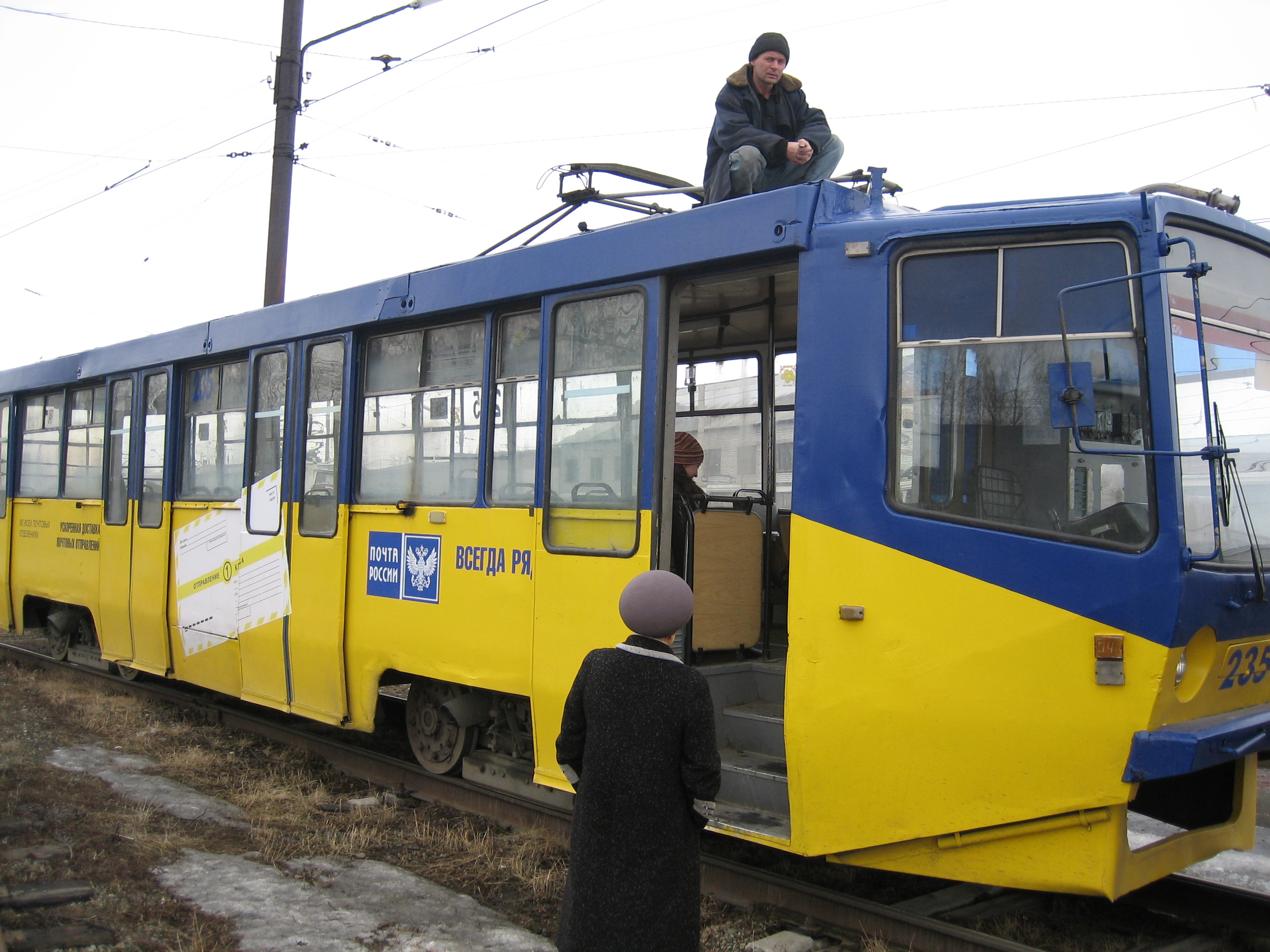 Аварийный ремонт пантографа трамвайного вагона №235 в Бийске.